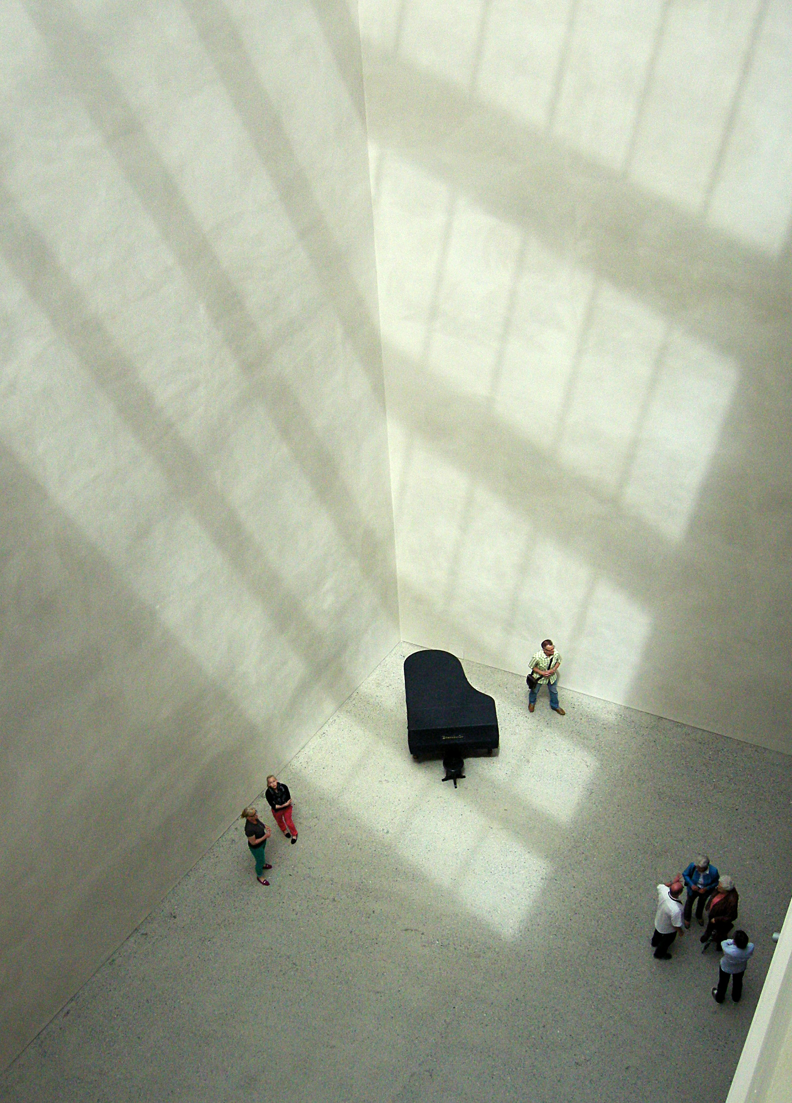 Bregenz – vorarlberg museum Dieses Bild wurde anlässlich des österreichischen Tags des Denkmals 2014 in Vorarlberg eingereicht.